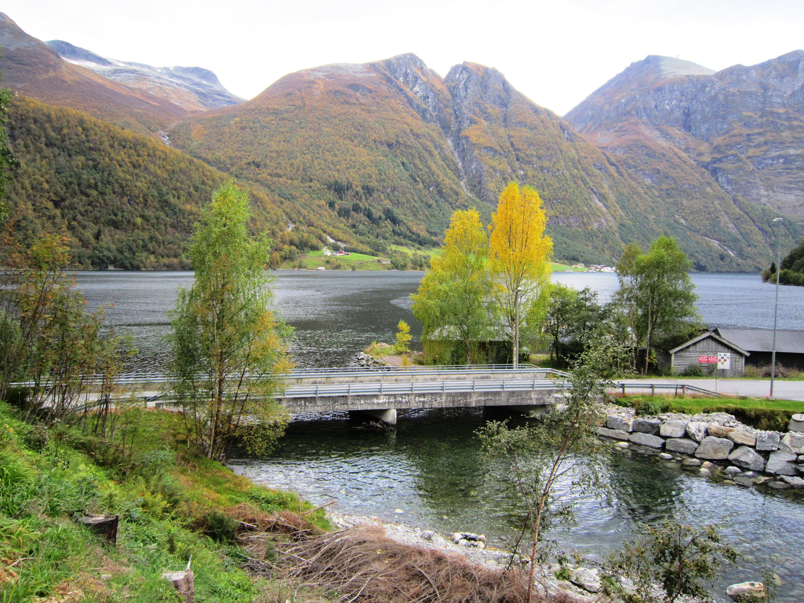 Fylkesvei 41 krysser Tysseelva (eller Tyssa) på Bjørke.